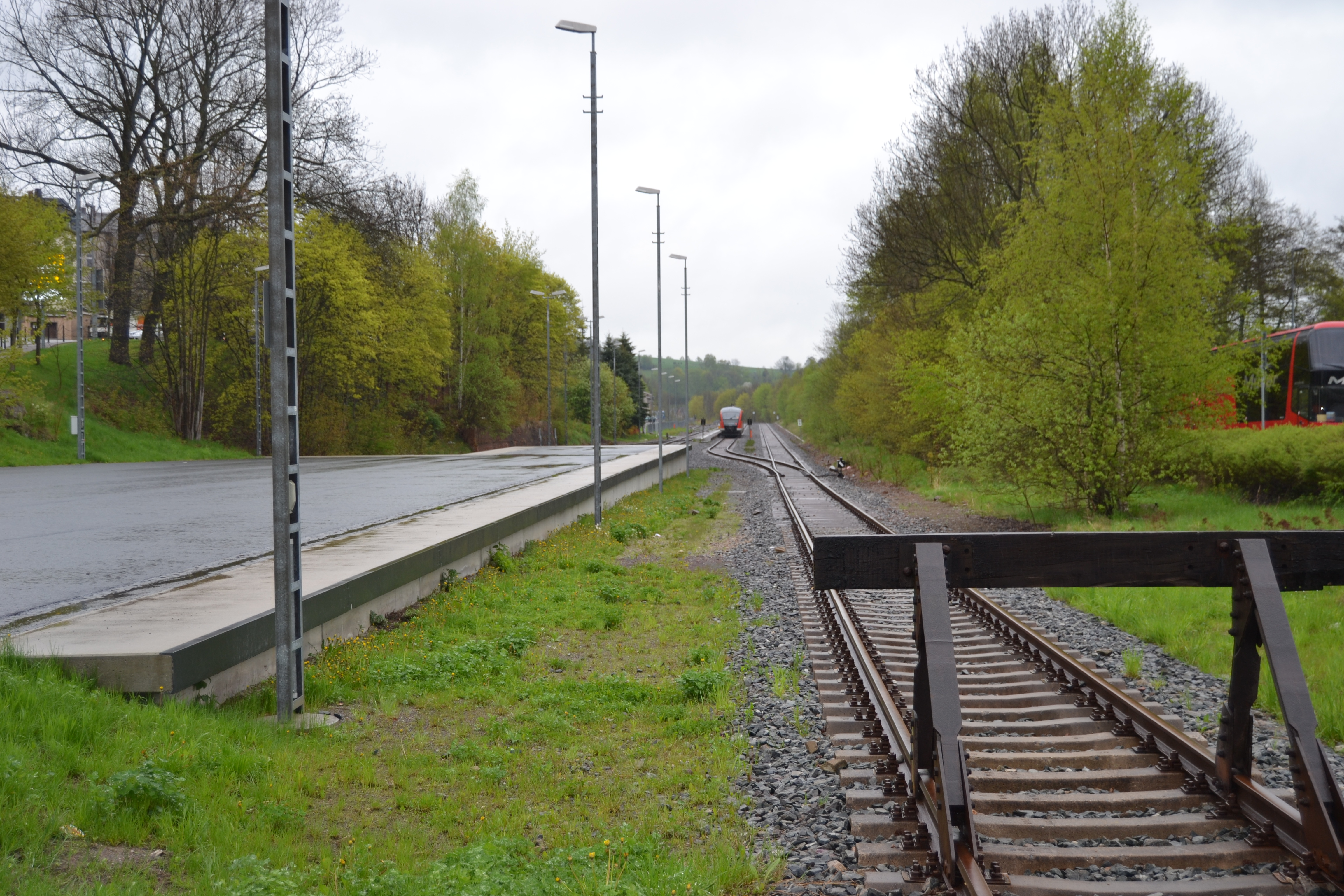 Blick vom heutigen Streckenende (am westlichen Ende des Bf Marienberg (Sachs)) des in noch in Betrieb befindlichen Abschnittes der Bahnstrecke Reitzenhain–Flöha auf die Gleisanlagen des Bahnhofs. Links im Bild die Laderampen für die Verladung von Fahrzeugen der Bundeswehr.